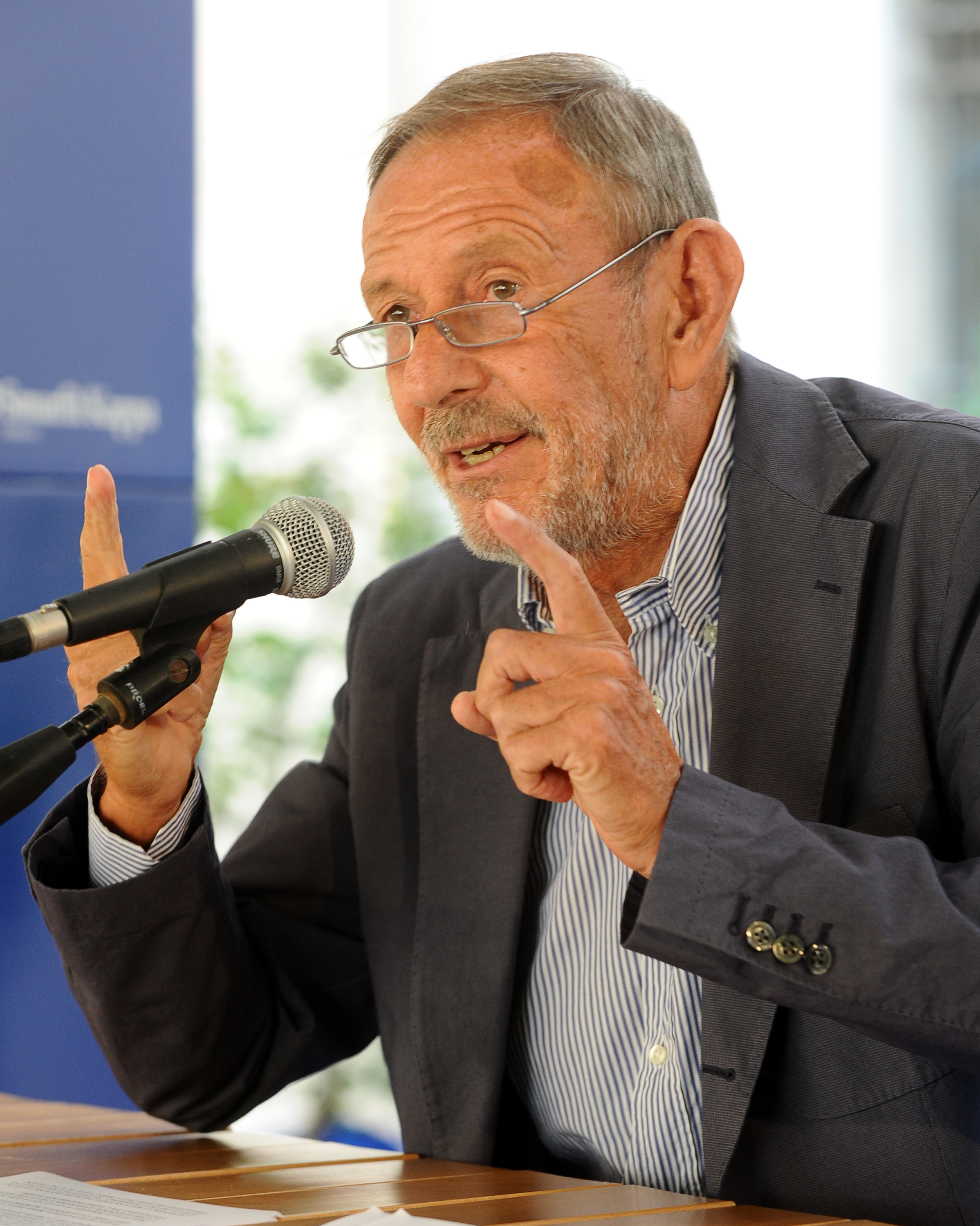 Umberto Curi a Mantova per il Festivaletteratura 2012.